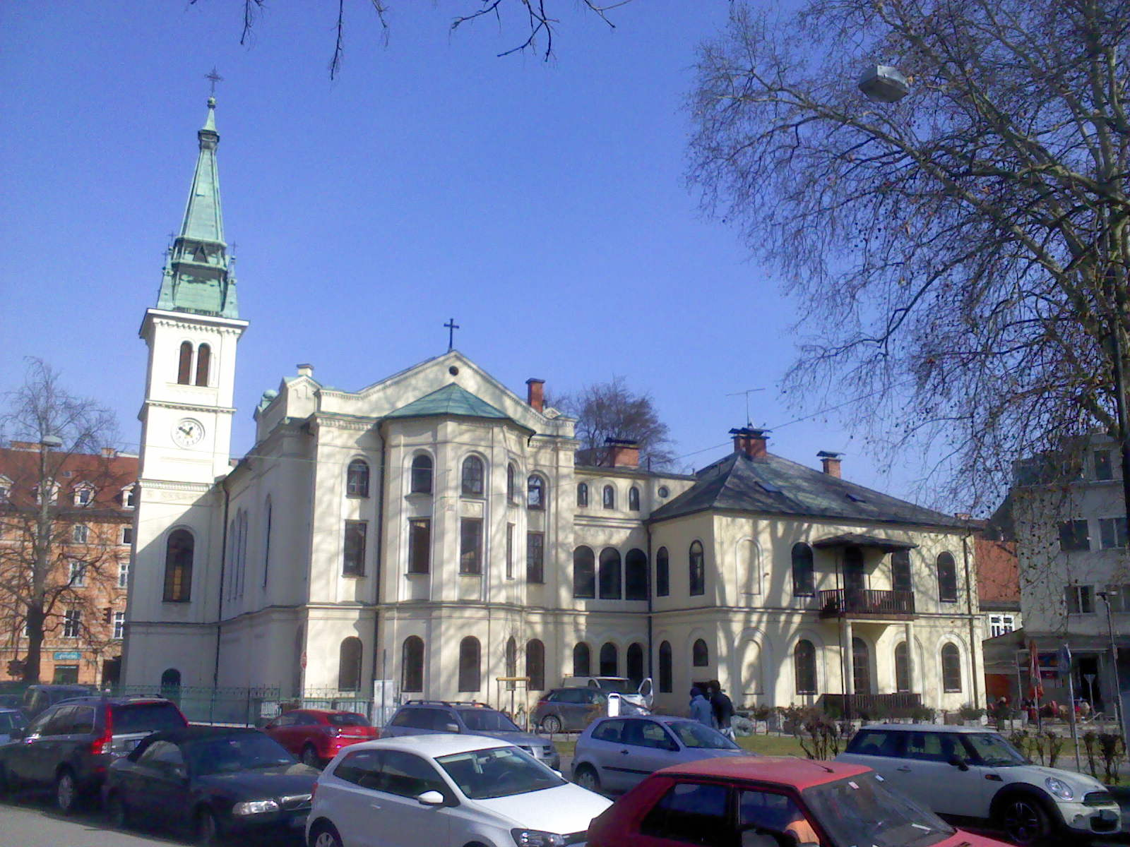 Evangeličanska cerkev Primoža Trubarja v Ljubljani